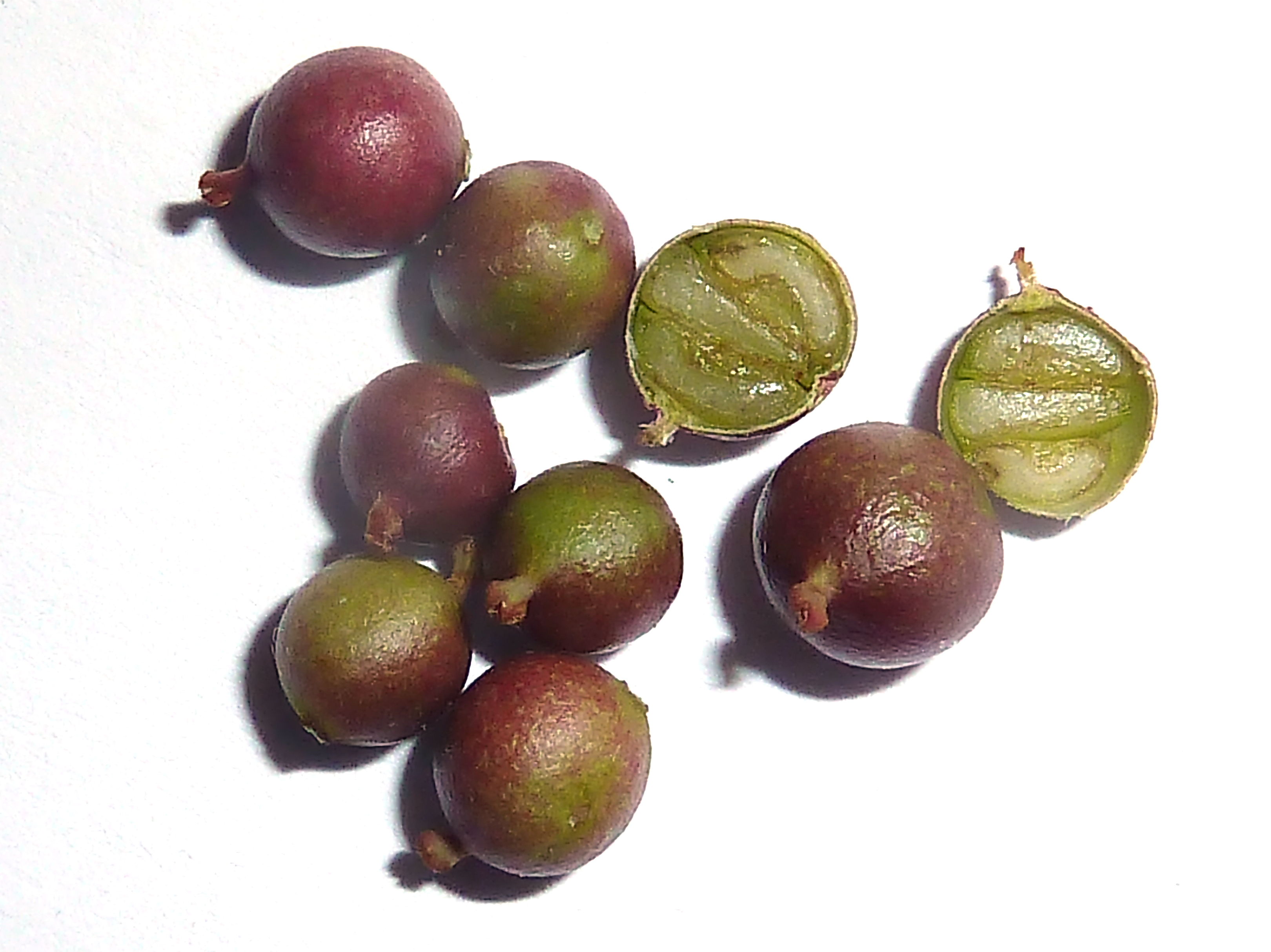 Nandina domestica (Bambú sagrado) - Frutos inmaduros sueltos; uno cortado con semillas visibles. -Cultivado/ornamental, Paseo de El Salvador, Parque del Buen Retiro, Madrid (España).